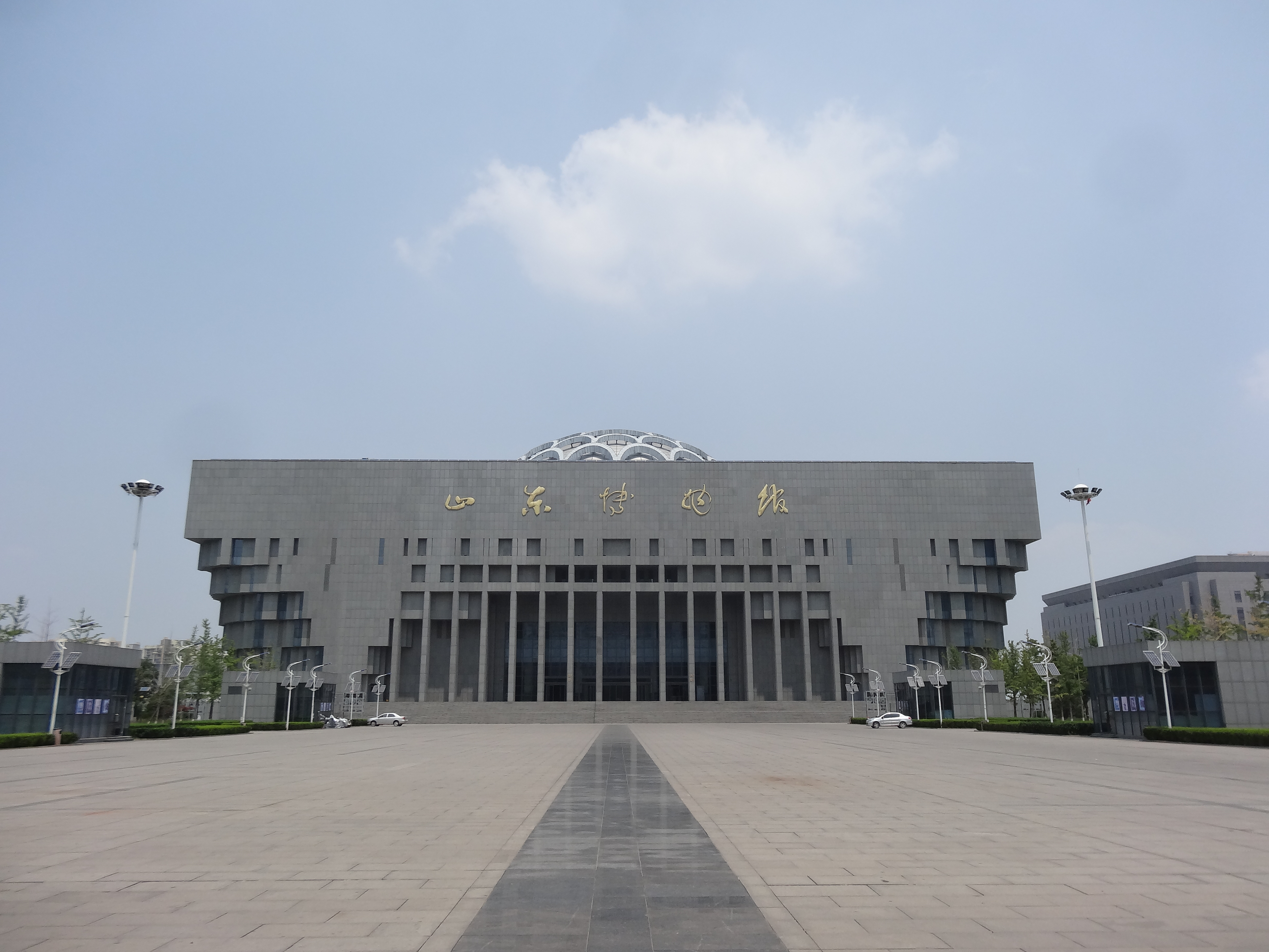 山东博物馆大楼